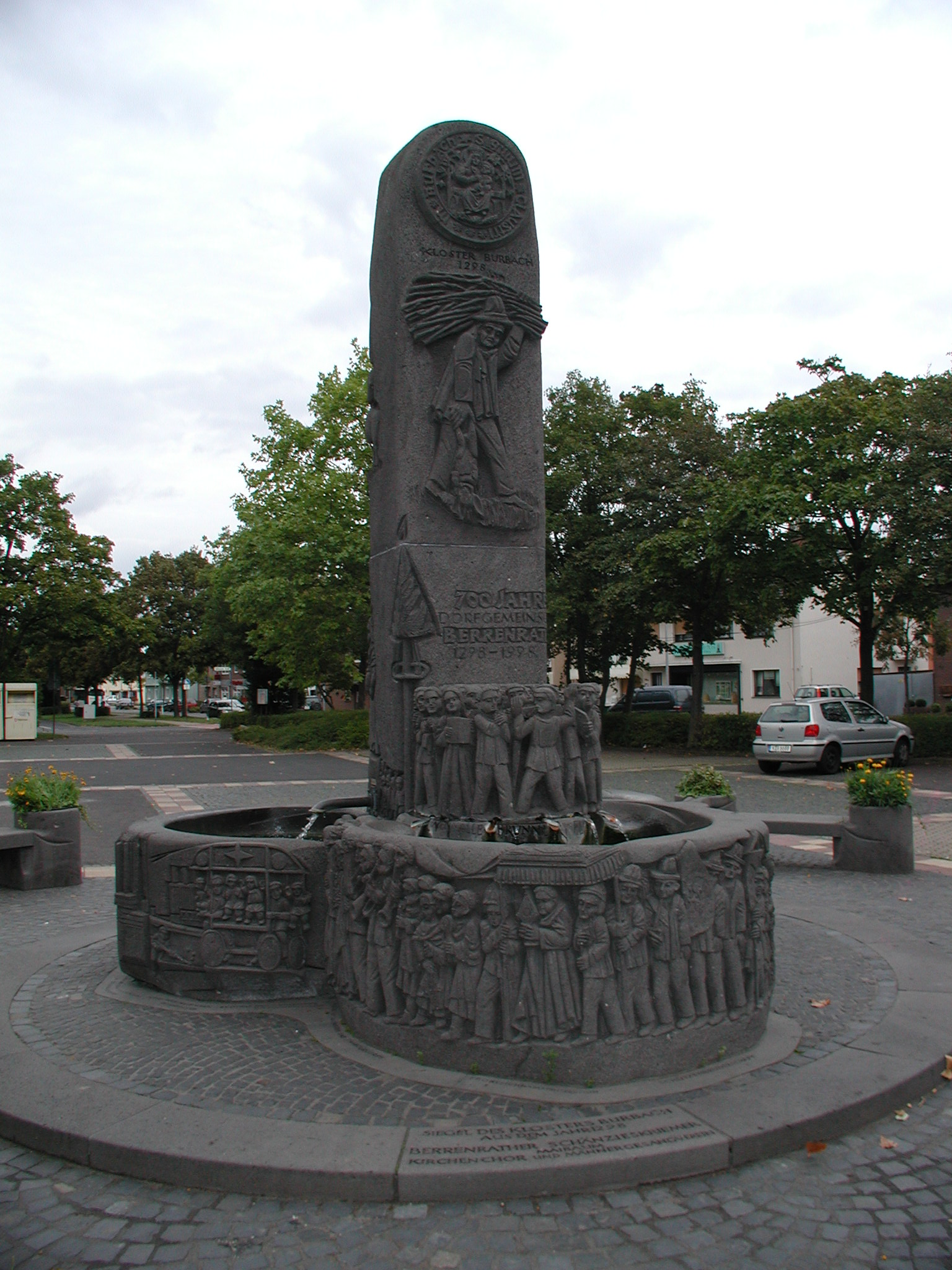 Hürth-Berrenrath, Brunnenanlage mit Berrenrather Motiven